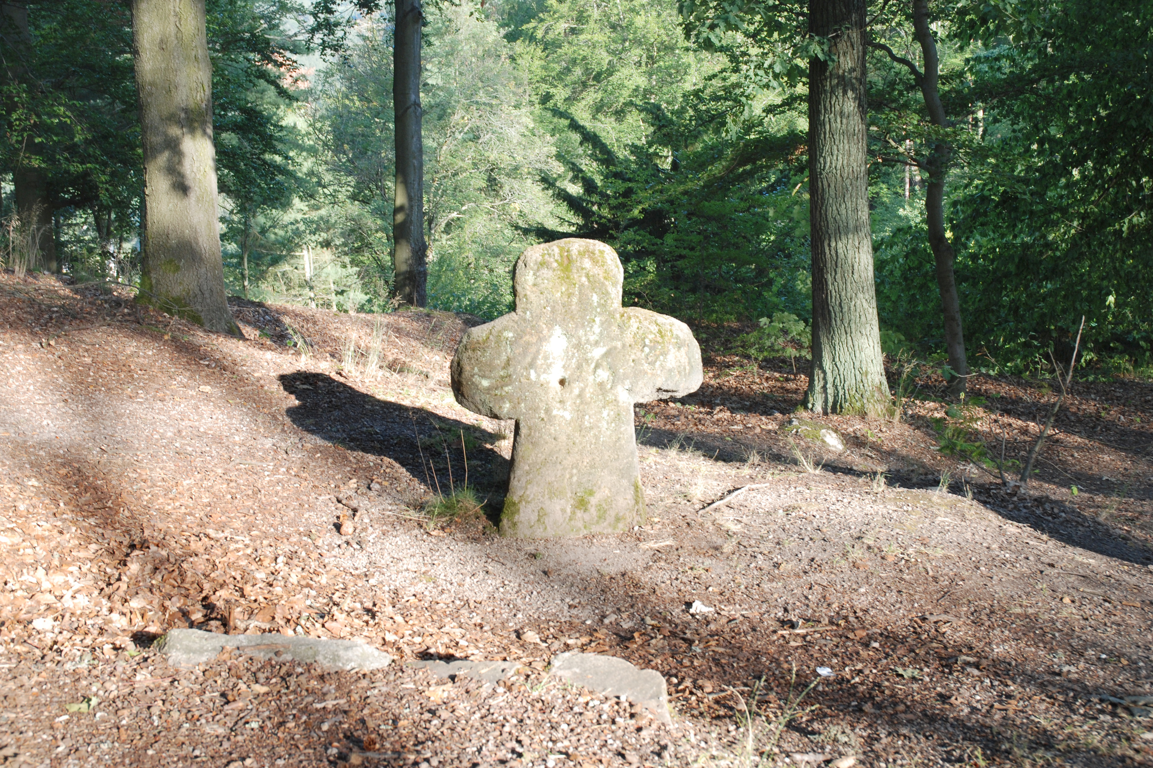 Smírčí kříž v karlovarských lázeňských lesích poblíž Findlaterova obelisku